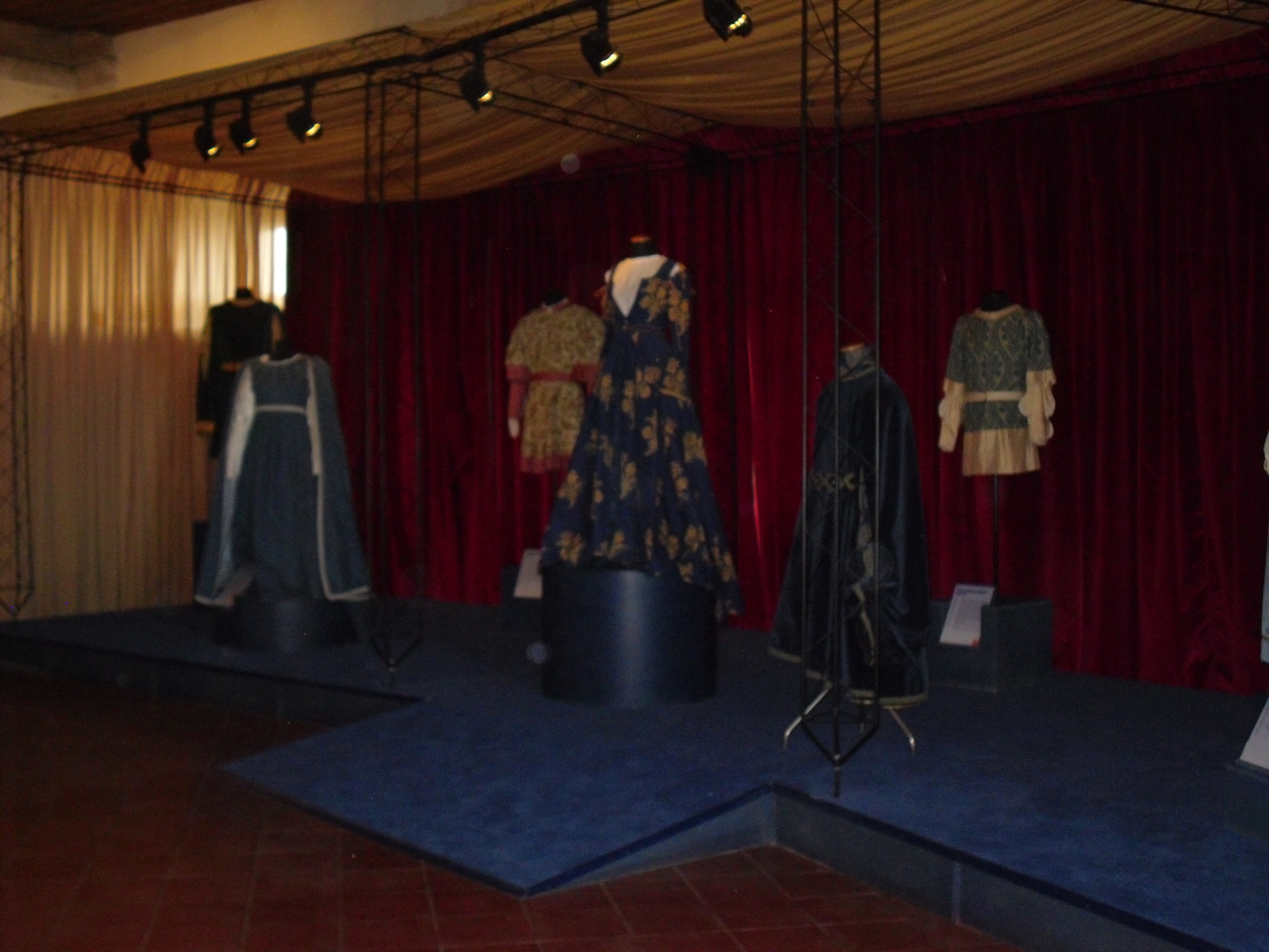 prima sala museo del cortume farnesiano